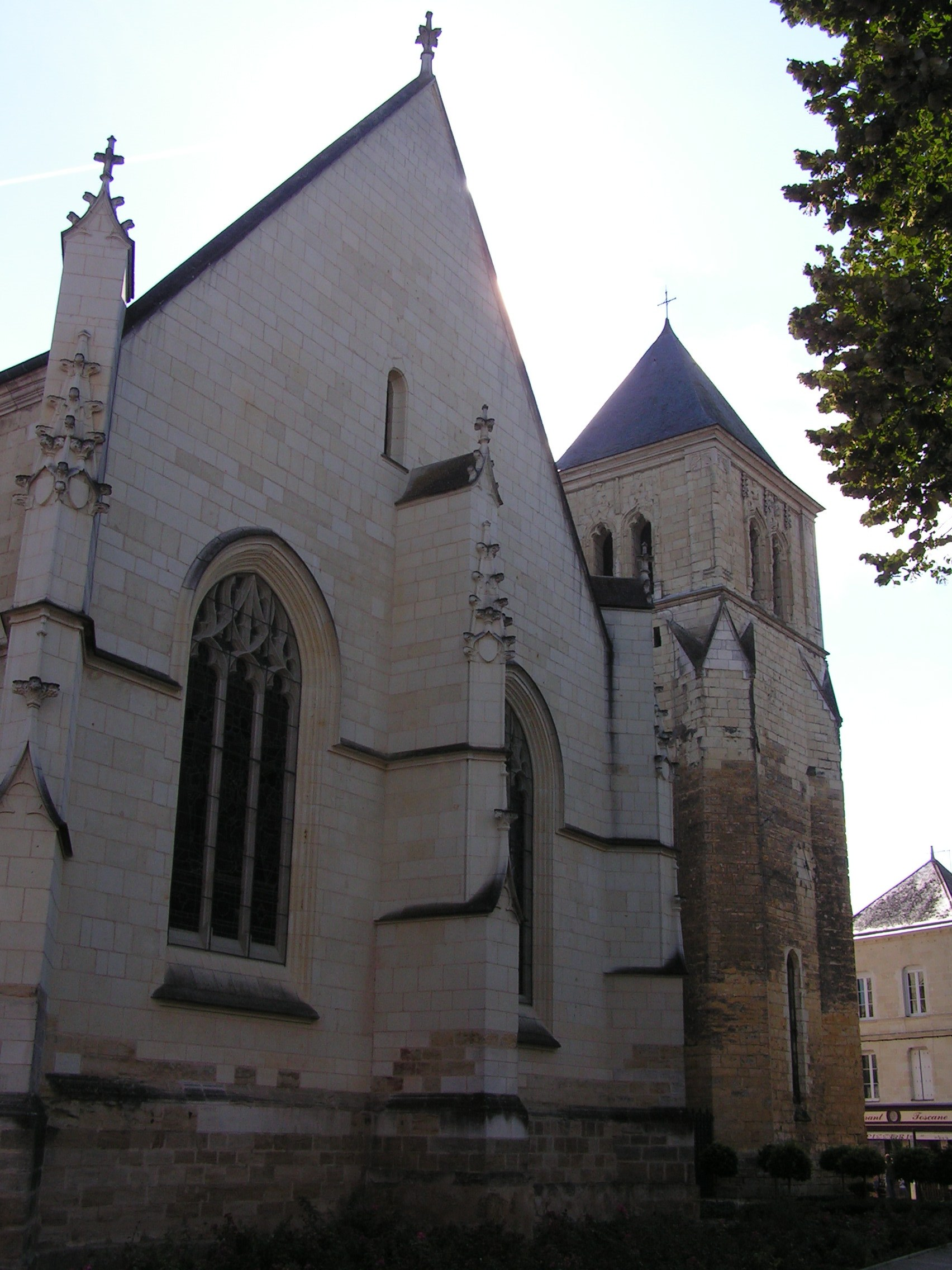 Eglise Saint-Médard